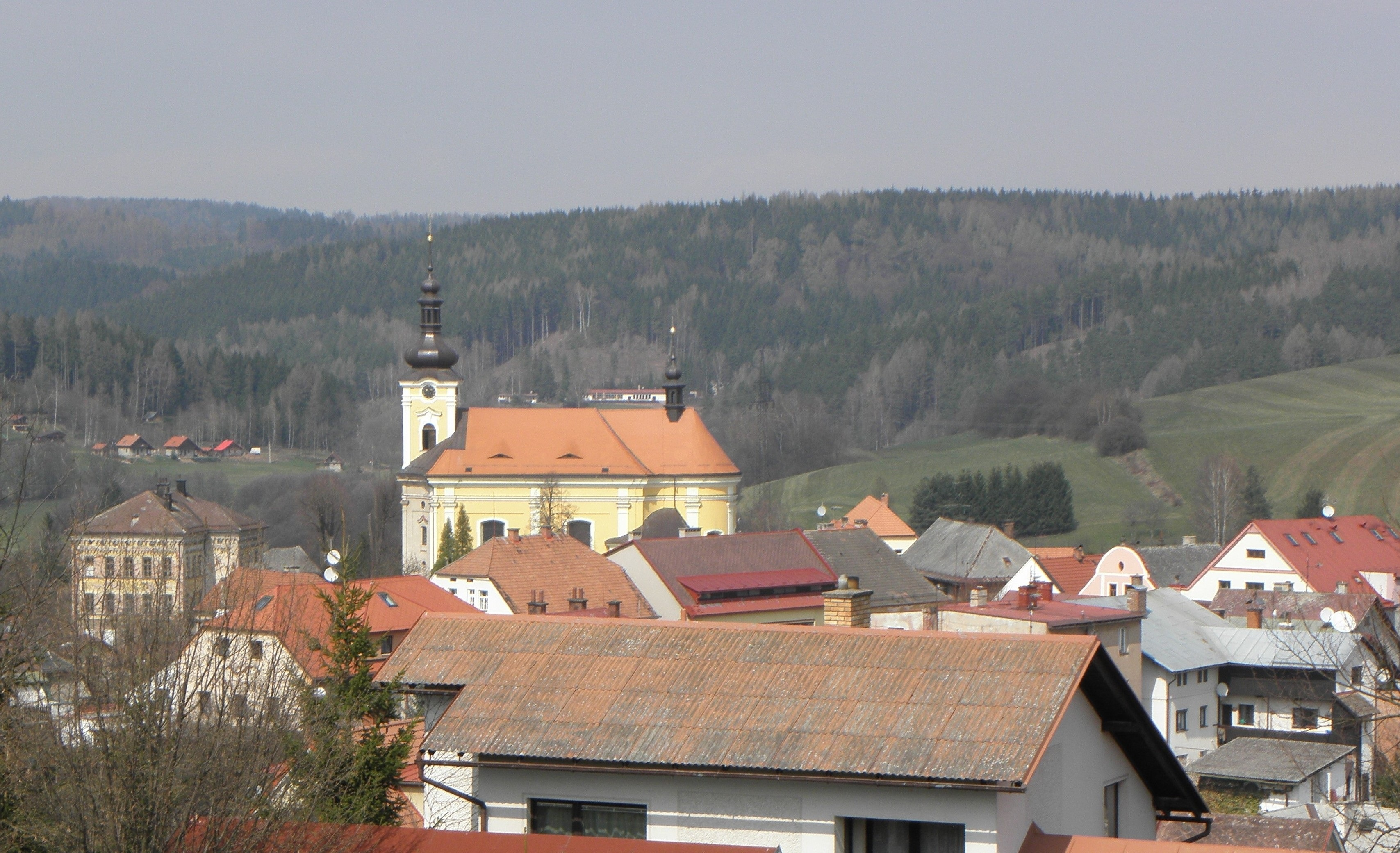 Městys Pecka (CZ); pohled od přjezdové cesty ke hradu Pecka